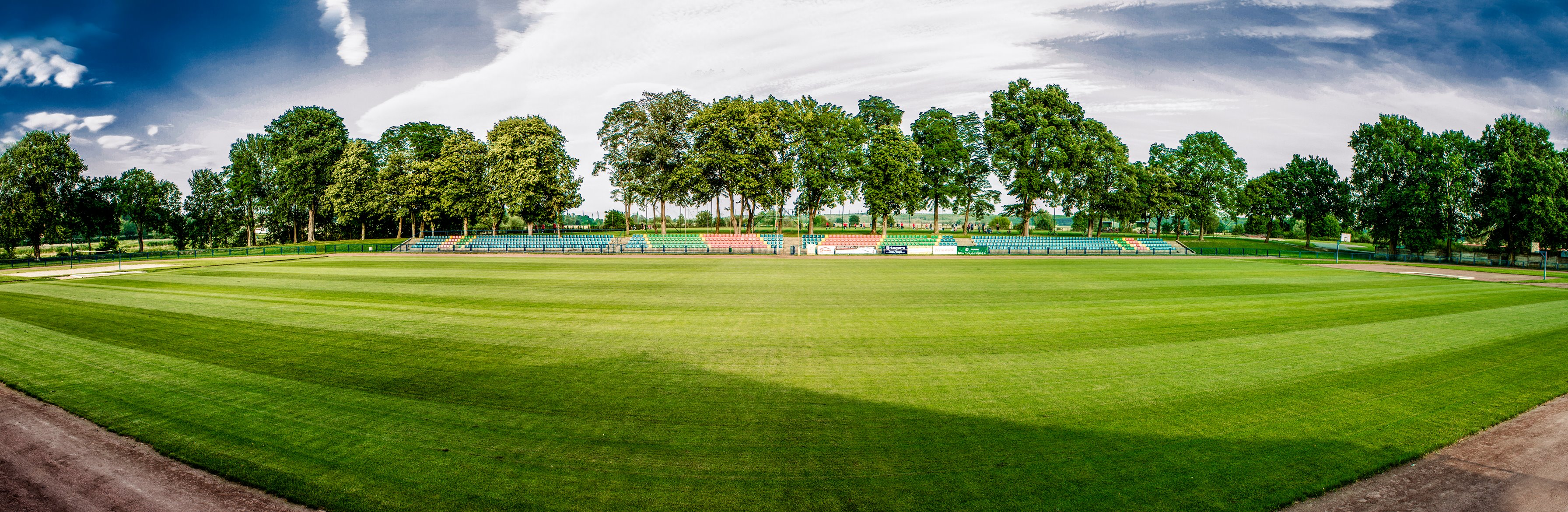 Szeroki widok stadionu Ośrodka Sportu i Rekreacji w Krośnie Odrzańskim przy ul. Pocztowej 27.